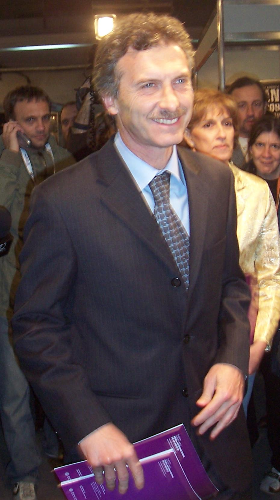 El jefe de Gobierno de la ciudad de Buenos Aires, Mauricio Macri, en la Feria Internacional de Música.